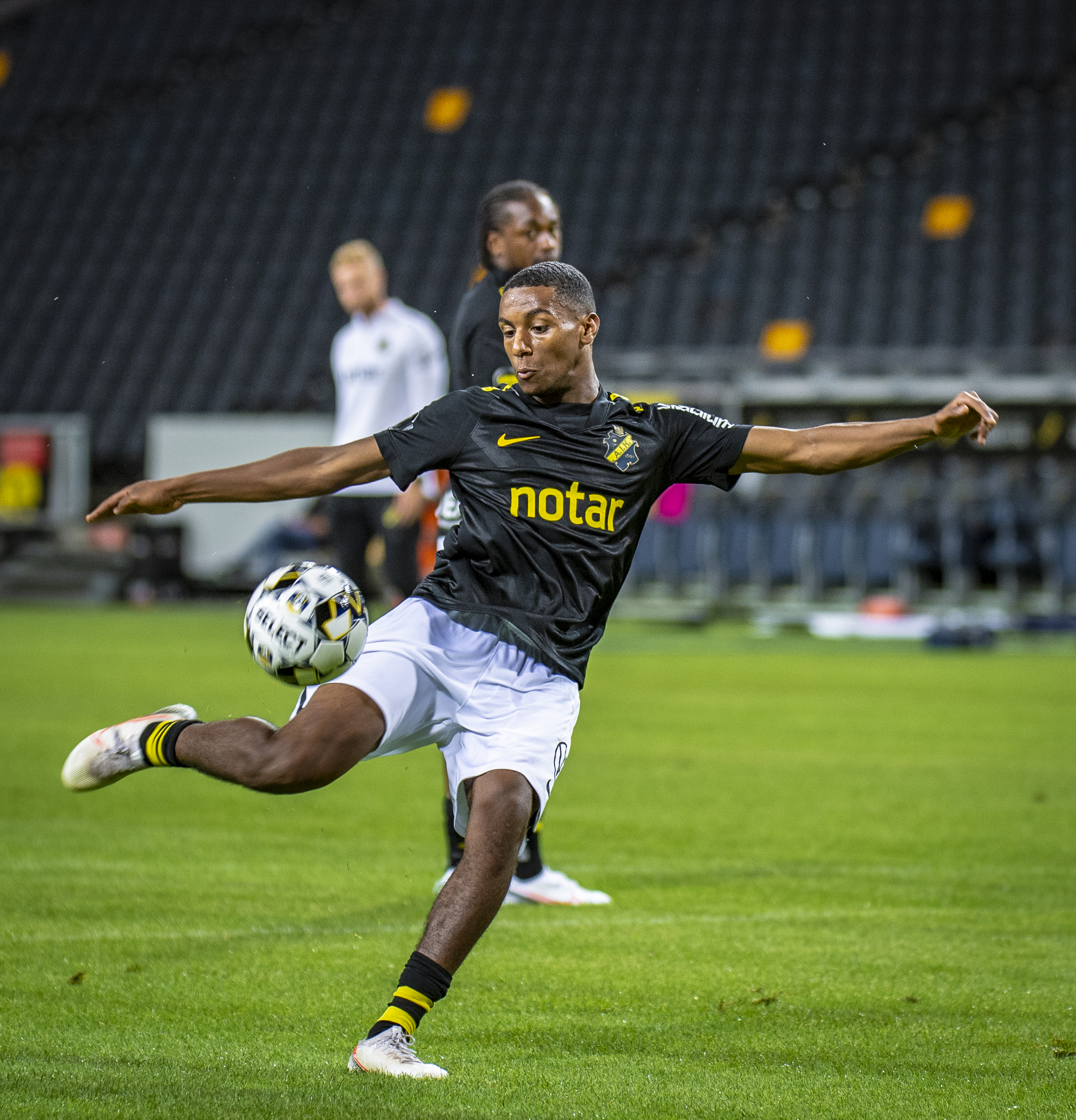 Paulos Abraham 5 juli 2020. Han gjorde AIK:s mål då man spelade 1-1 mot Falkenberg på Friends Arena.